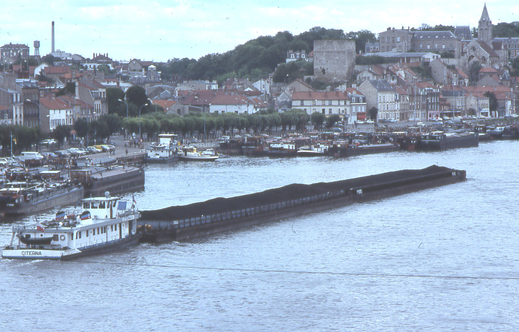 au premier plan un convoi poussé; au second plan des automoteurs amarés aux berges de la Seine. Au fond la ville de Conflans-Sainte-Honorine, capitale de la batellerie française. Vue prise en 1970.